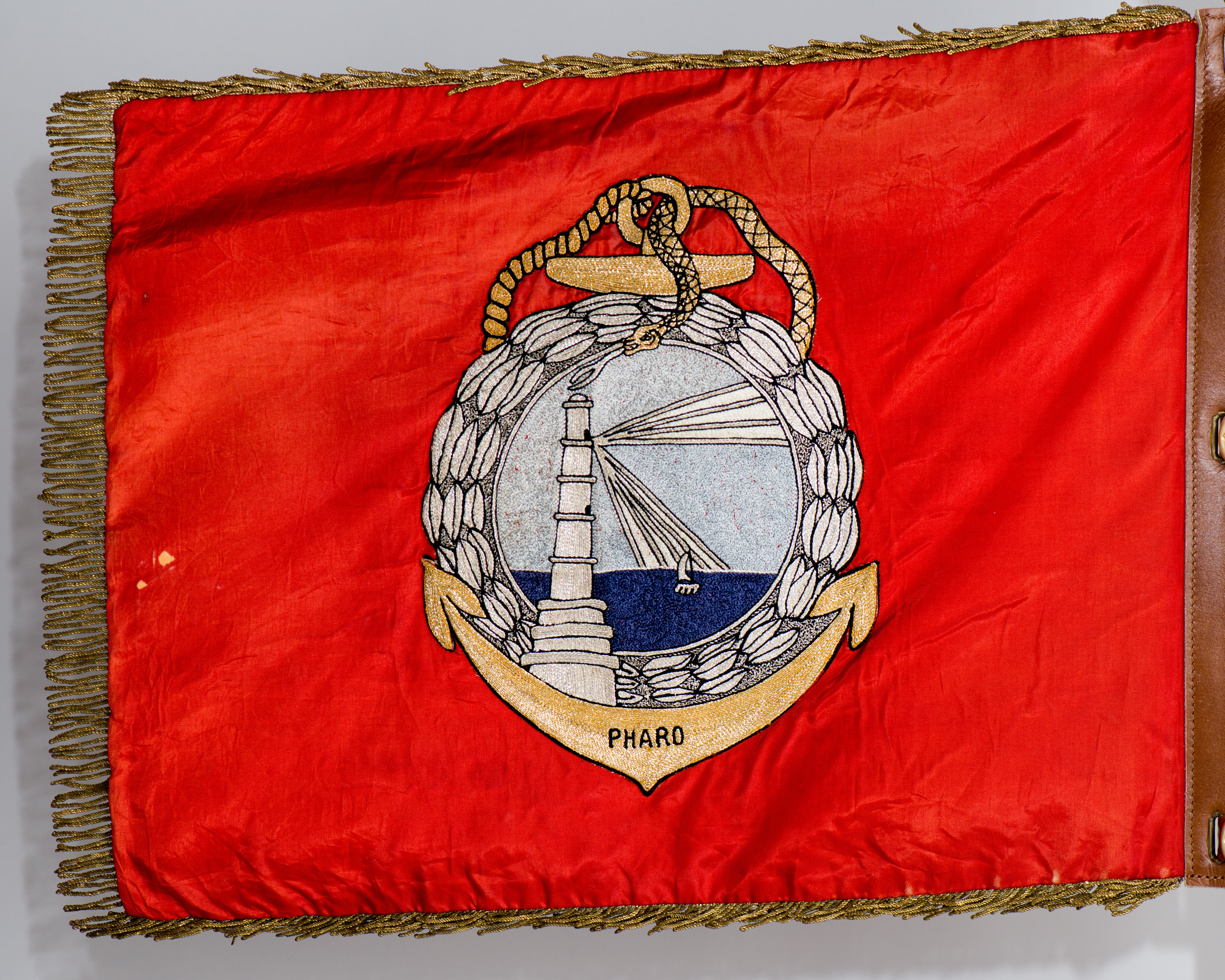 Fanion d'établissement militaire du service de santé français, de couleur rouge de tradition pour le service médical